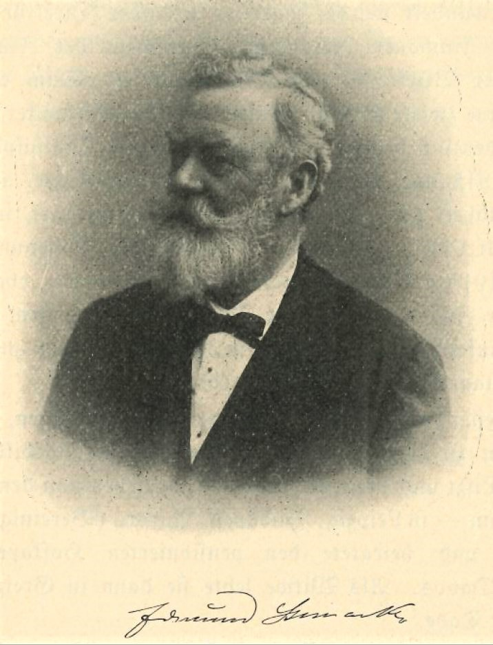 Bildnis des Publiszisten und Politikers Edmund Steinacker